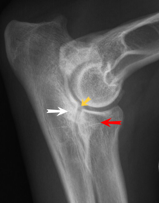 elbow dysplasia in a dog